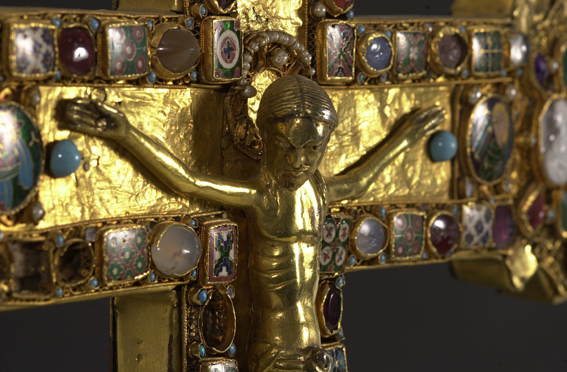 Detailaufnahme des Mathildenkreuzes des Essener Domschatzes. Bild der Domschatzkammer Essen, auf strikte Einhaltung der Lizenz bei Weiterverwendung ist zu achten!